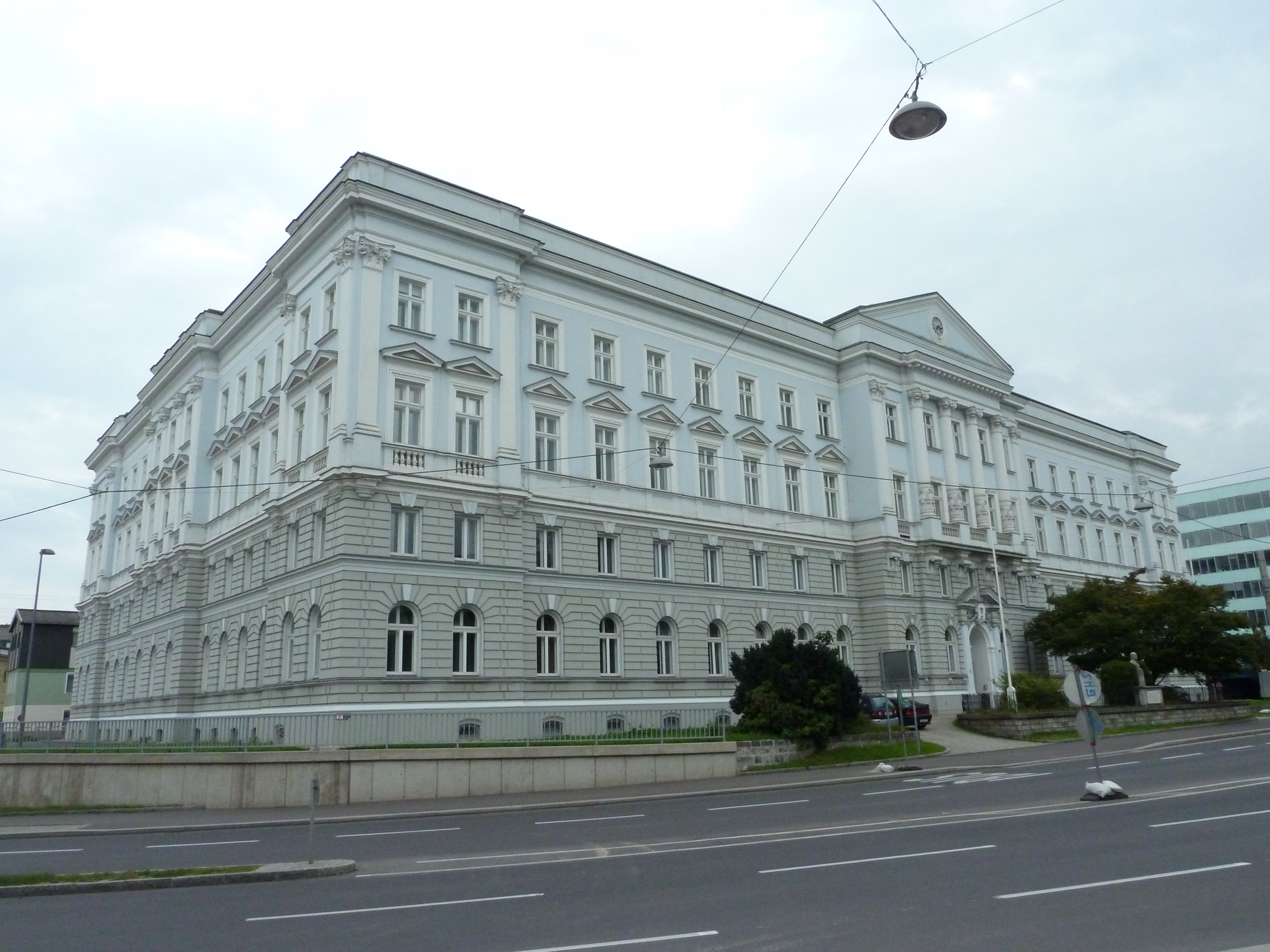 Verwaltungs- und Direktionsgebäude der ÖBB